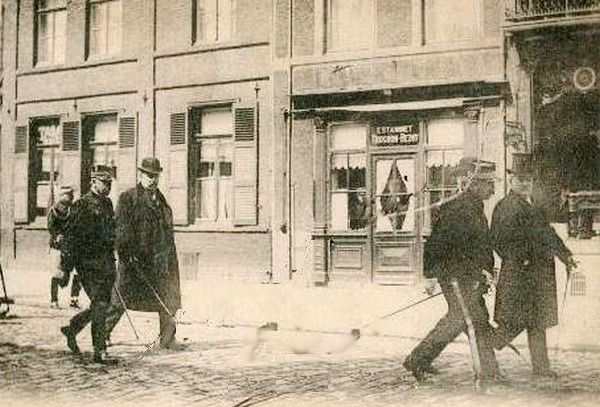 Clemenceau se rends la gare de Lens à Pied vers la maison du peuple